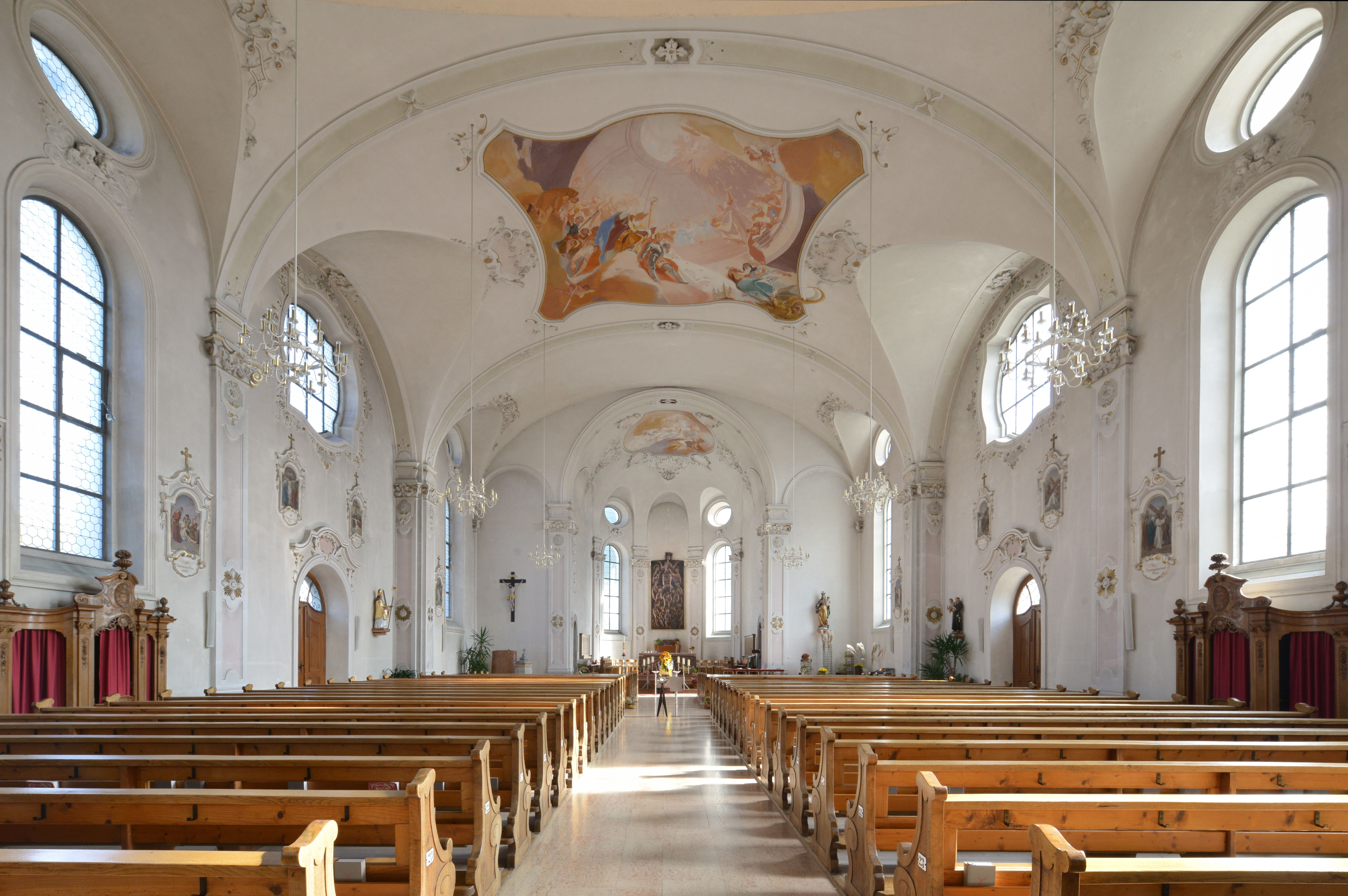 Pfarrkirche Hl.Kilian, 1905-1907 erbaut nach Plänen von Albert Rimli im Neobarock. Koblach, Vorarlberg